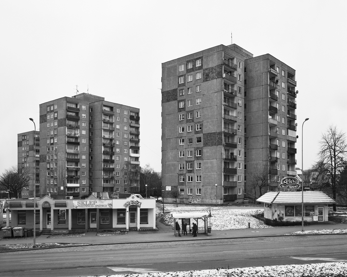 Plattenbau, Typ w-70 in Zielona Góra (Grünberg) in Polen. Der Typ W-70 ist verwandt mit dem ostdeutschen Typ WBS70.